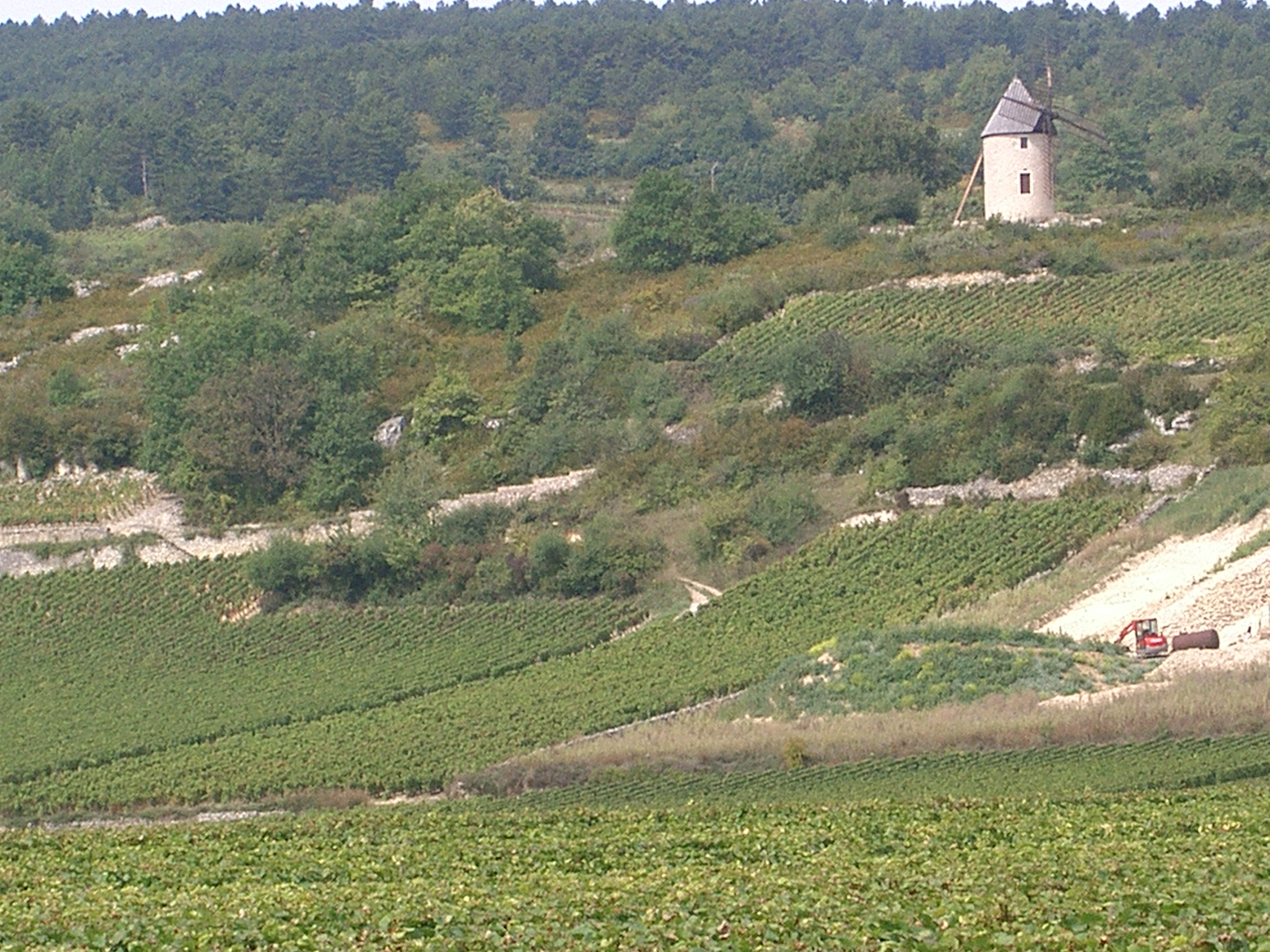 vignoble de Santenay en Côted'Or (France), au pied du moulin Sorine